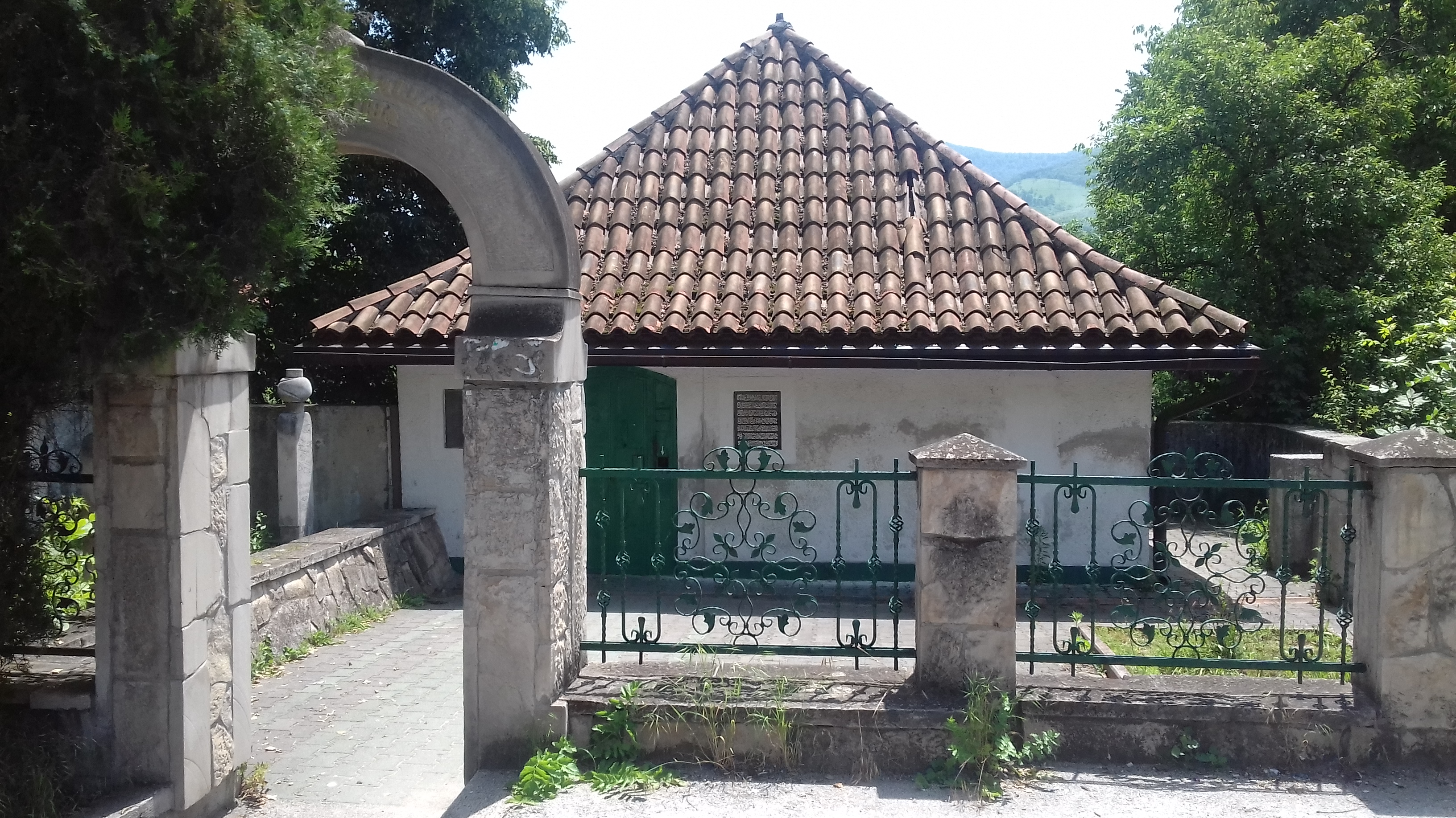 Зеничко турбе на Билмишту